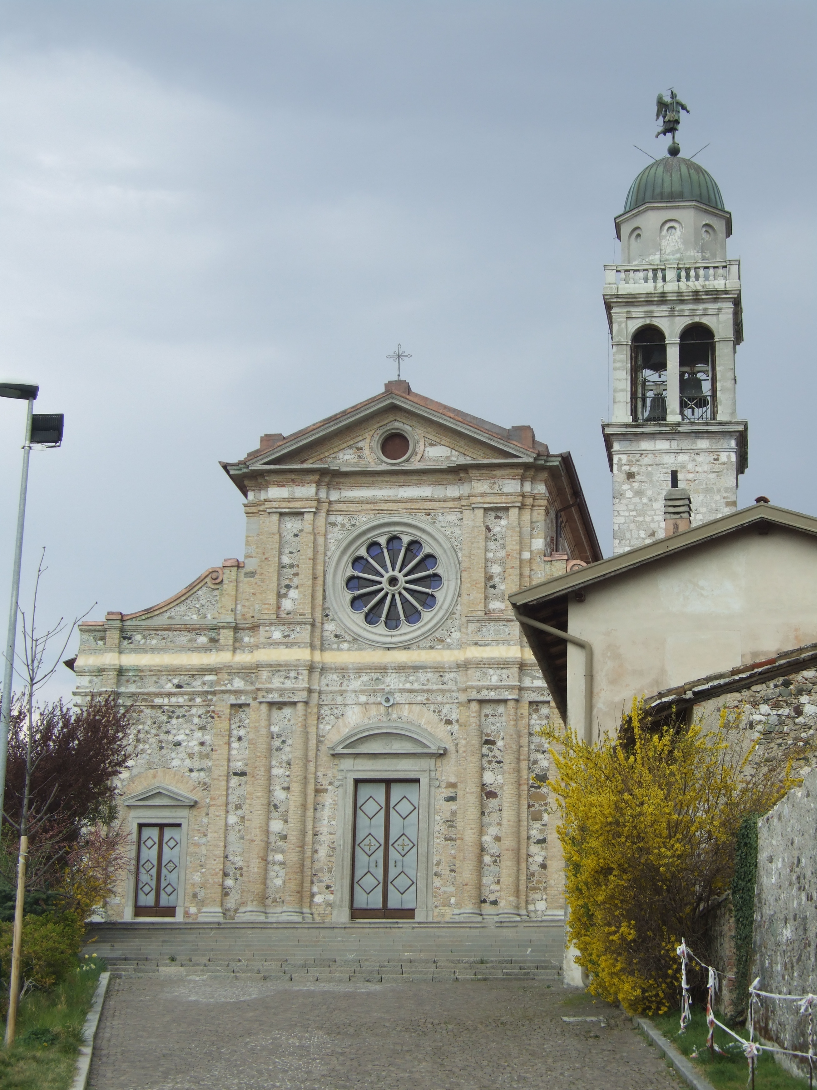 Moruzzo - Chiesa